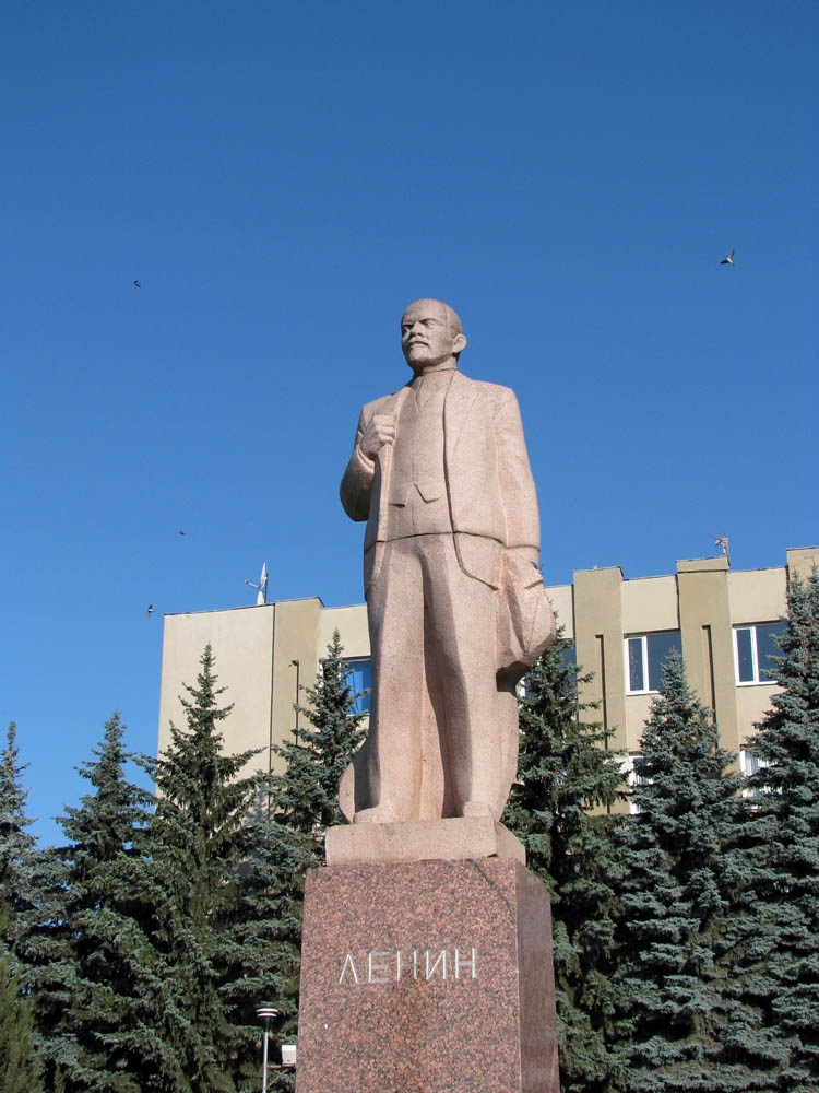 Монумент Ленина в городе Бричаны!